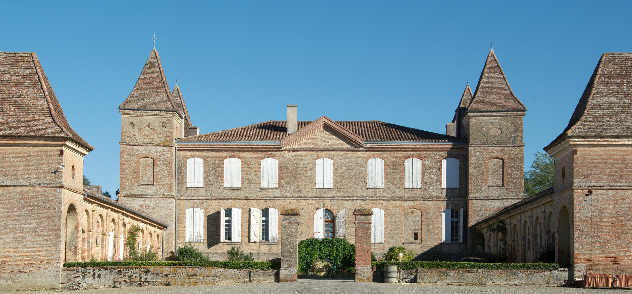 Château de Bézéril (Gers, France) .